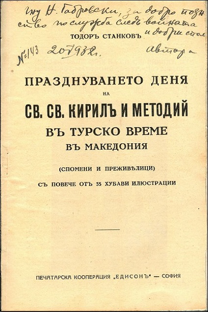 "Празнуването на Св. св. Кирил и Методий"